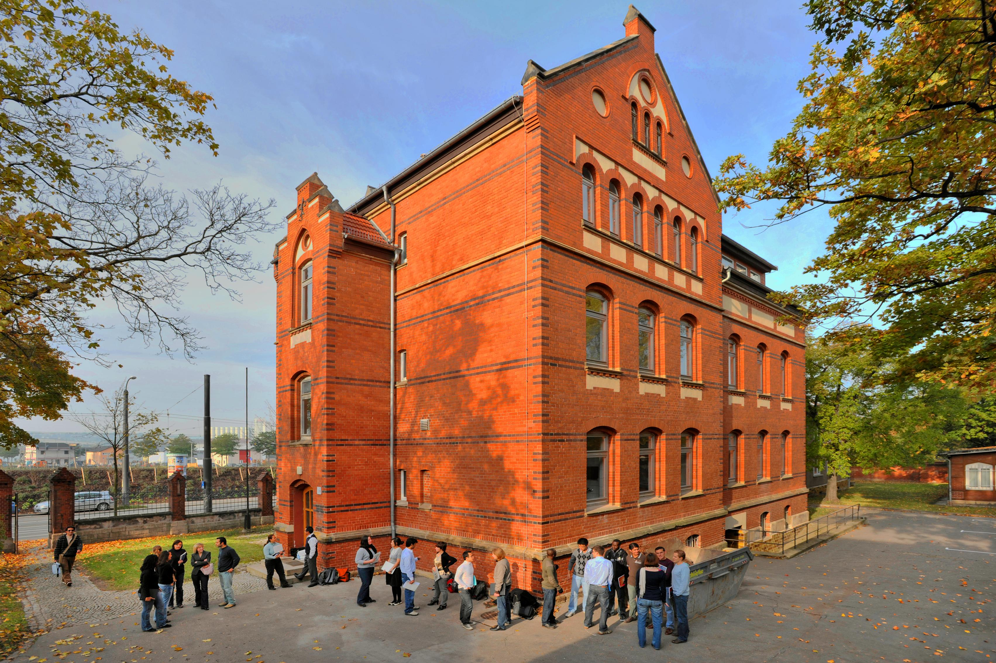 Gebäude der Willy Brandt School of Public Policy Erfurt in der Nordhäuser Str. 63 in 99089 Erfurt